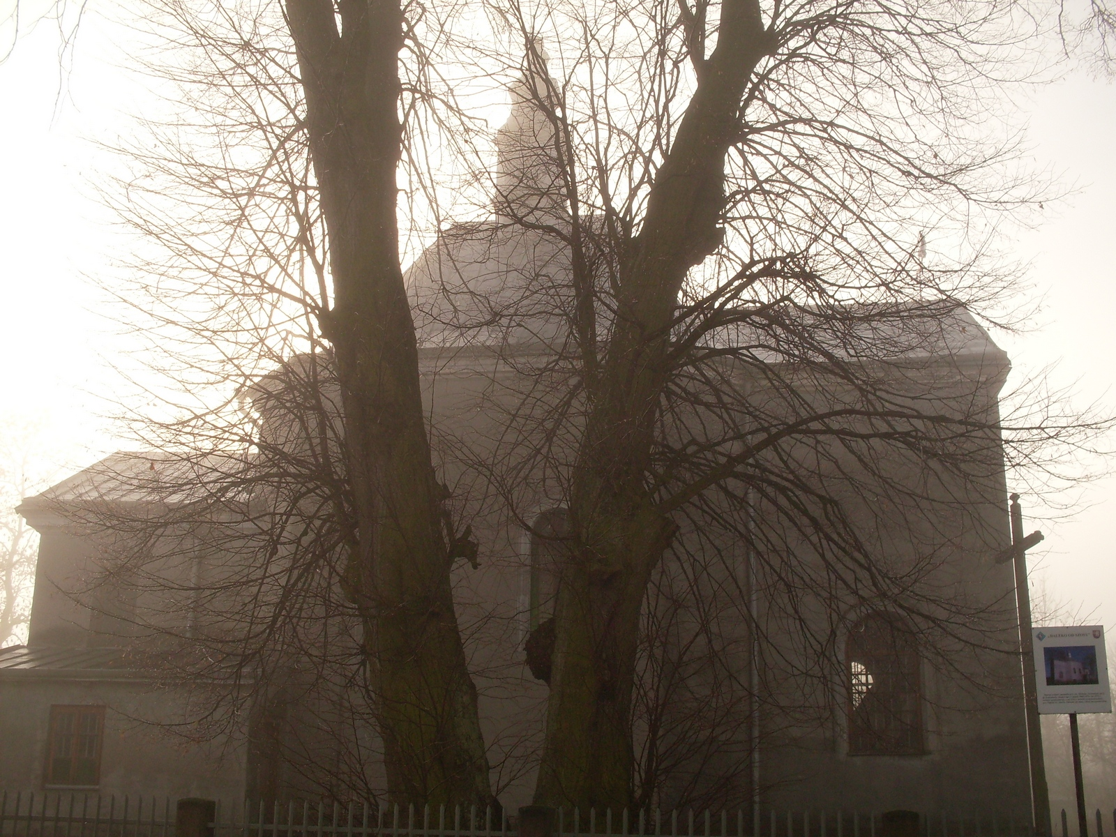 Cyców - zespół dawnej cerkwi greckokatolickiej: dawna cerkiew greckokatolicka, obecnie kościół parafialny rzymskokatolicki p.w. Opieki św. Józefa (1860-1870), figura Matki Boskiej, dzwonica